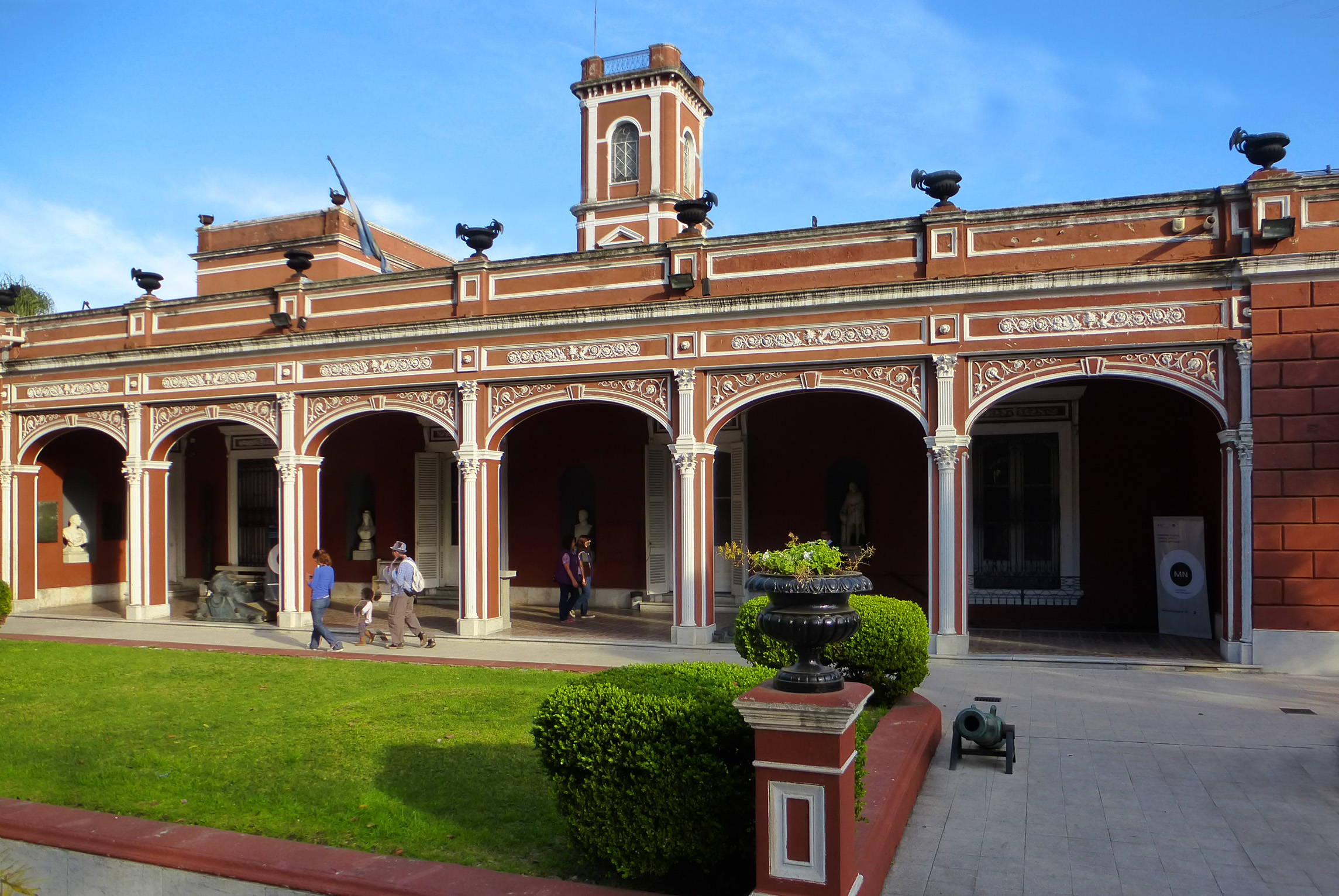 Residencia de don Gregorio Lezama y Parque Lezama